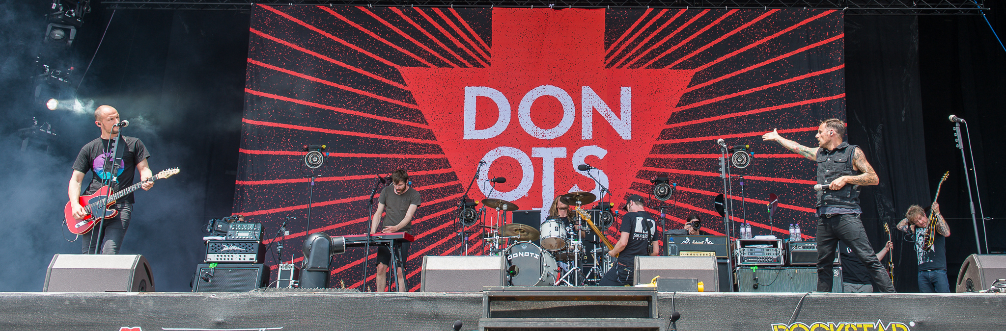 ARGO-Konzerte,Alex Siedenbiedel,Donots,Eike Herwig,Festival,Guido Knollmann,Ingo Knollmann,Jan-Dirk Poggemann,Konzert,Livekonzert,Livemusik,Musik,RiP,Rock im Park 2015,Seat Zeppelin Stage